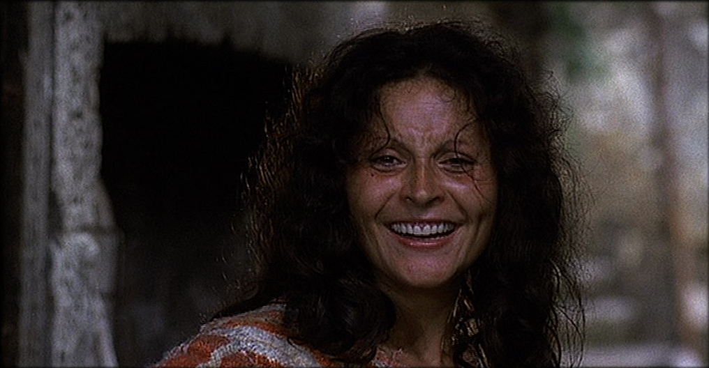 Screenshot del film Il Decameron (1971).